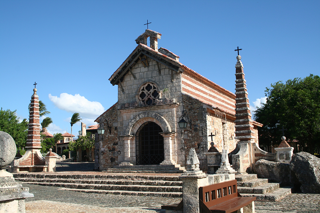 Altos de Chavon, Dominicana